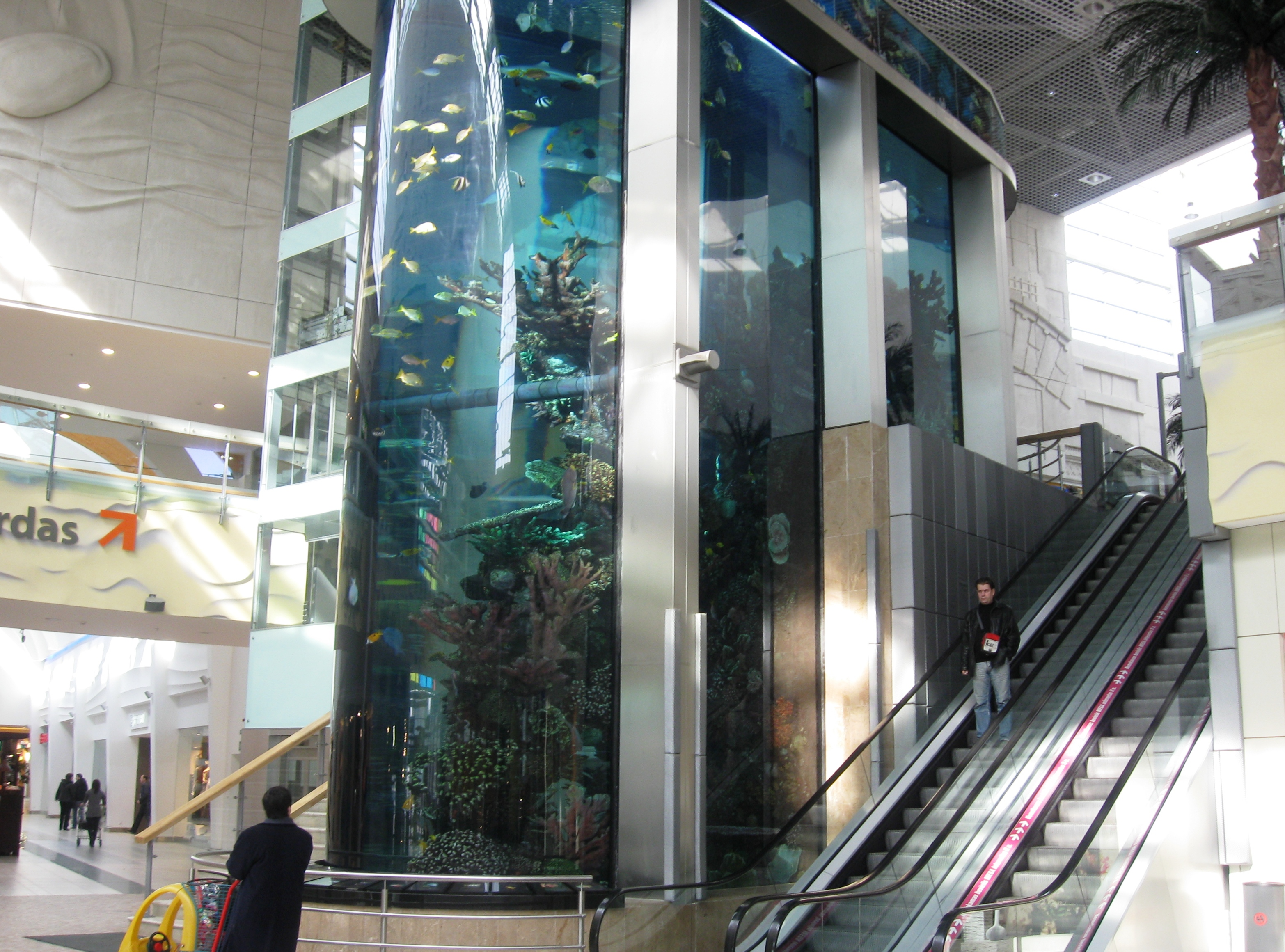 Akvariumas prekybos centre „Mega“, Kaunas.